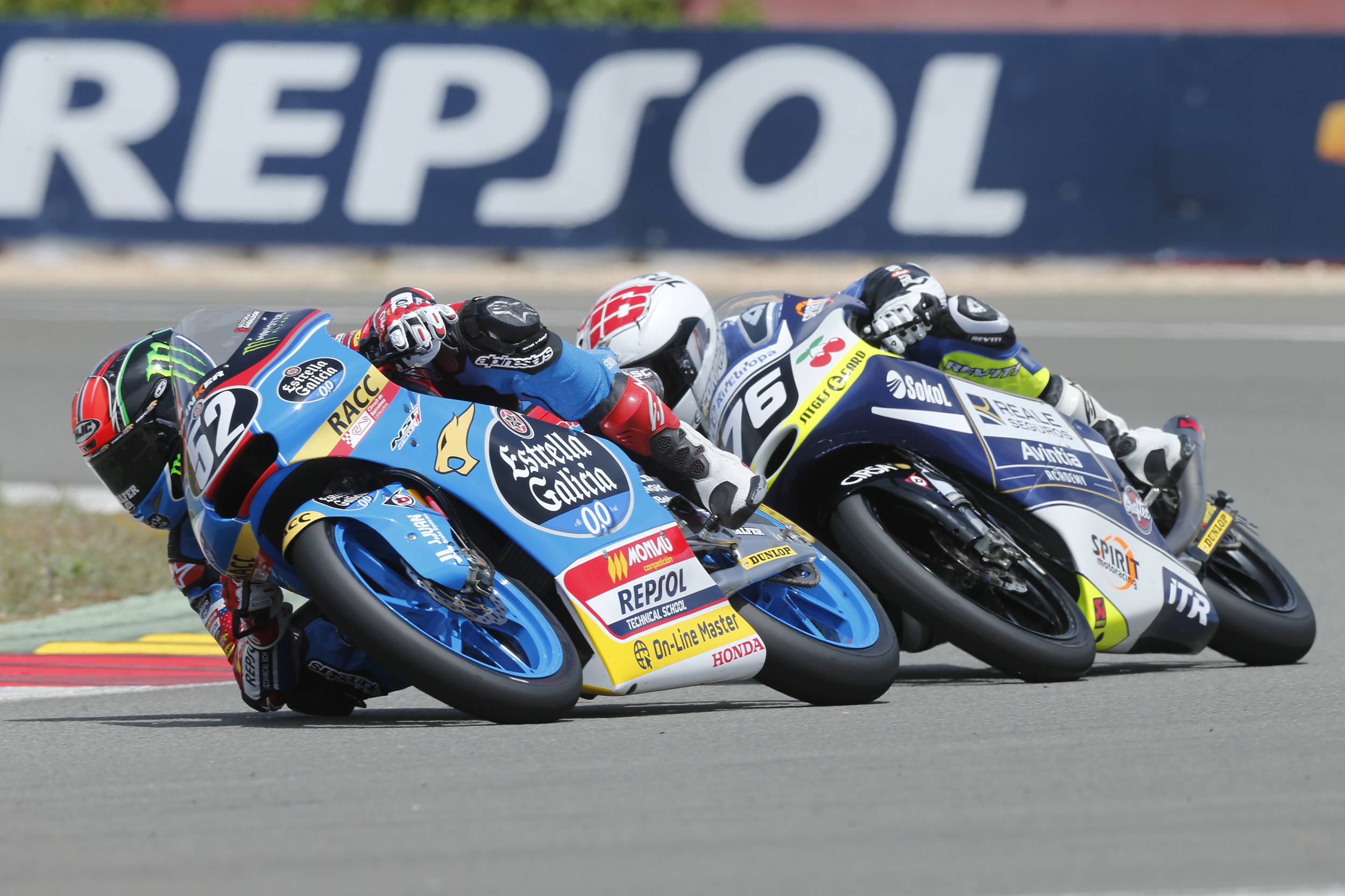 FIM CEV Repsol International Championship 2017. Circuito de Albacete. España